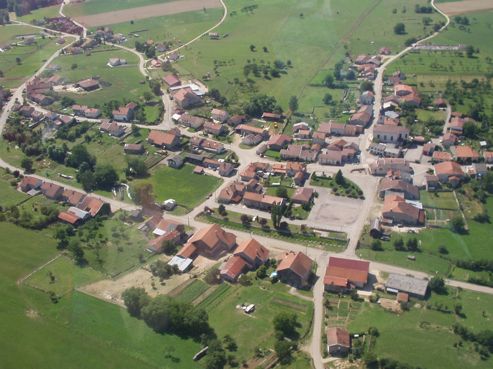 Photo aérienne du ventre du village prise par hélicoptère